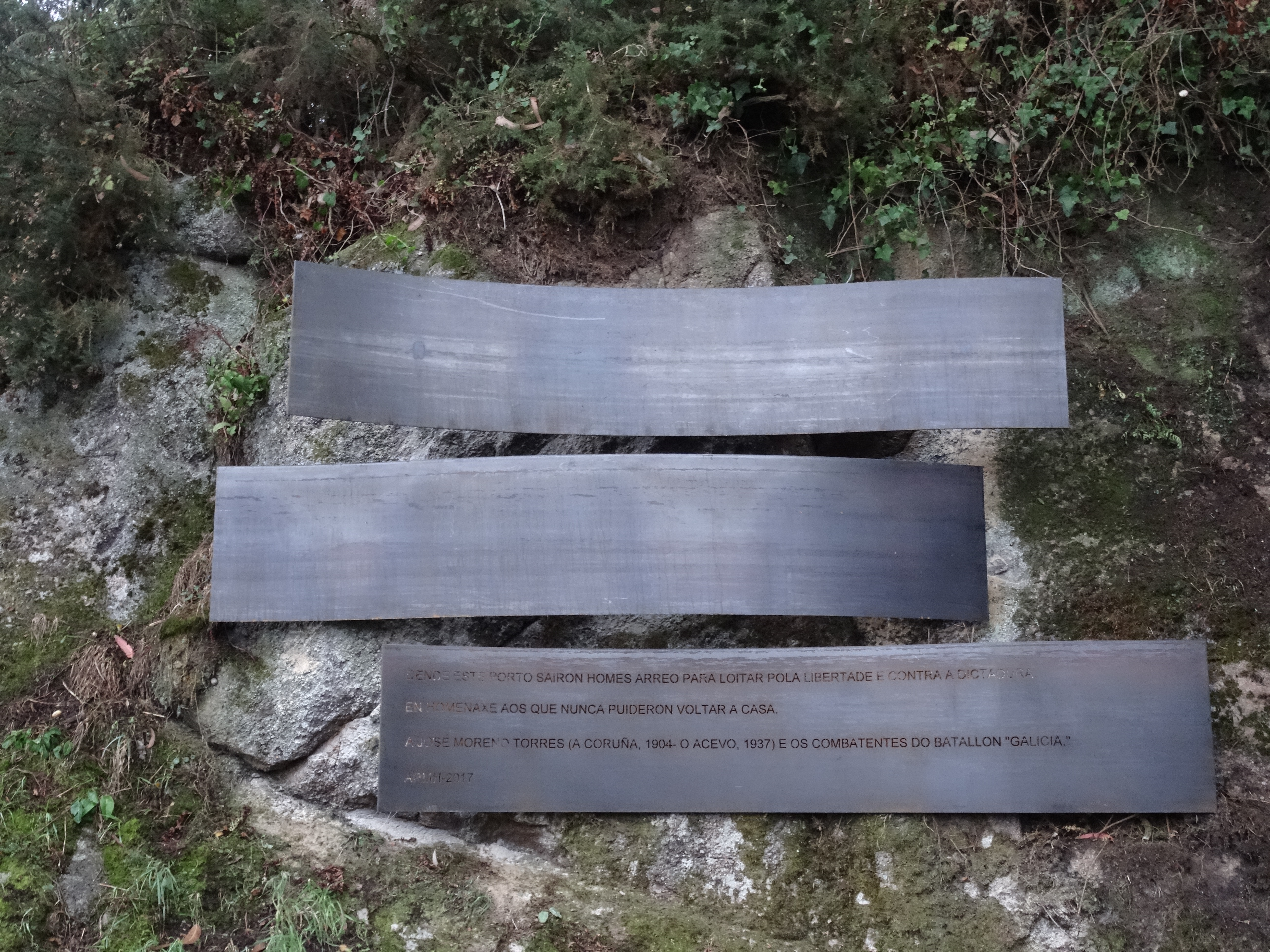 Ver título.